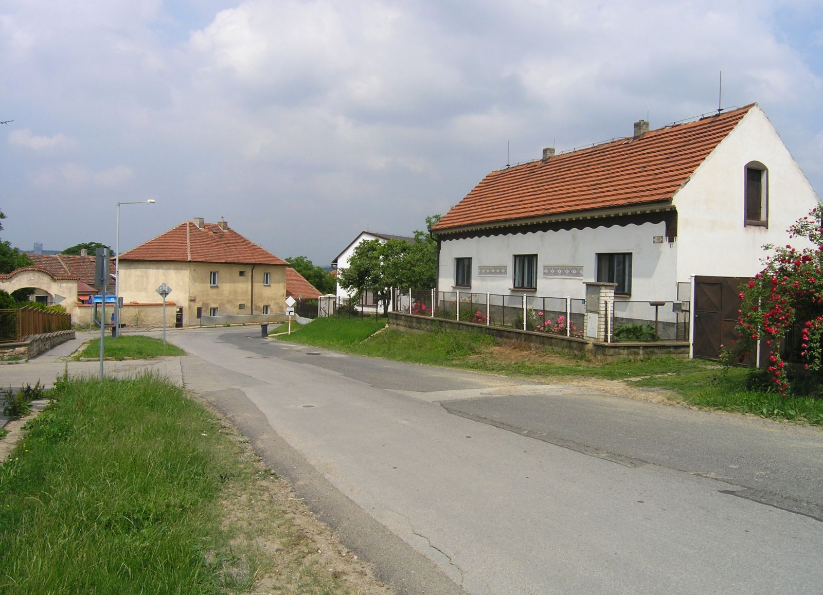 U Náhonu street at Praha-Holyně Ulice U Náhonu v Praze-Holyni